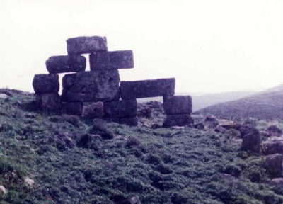 العتبات في منطقة العرايس الأثرية في بلدة عبا